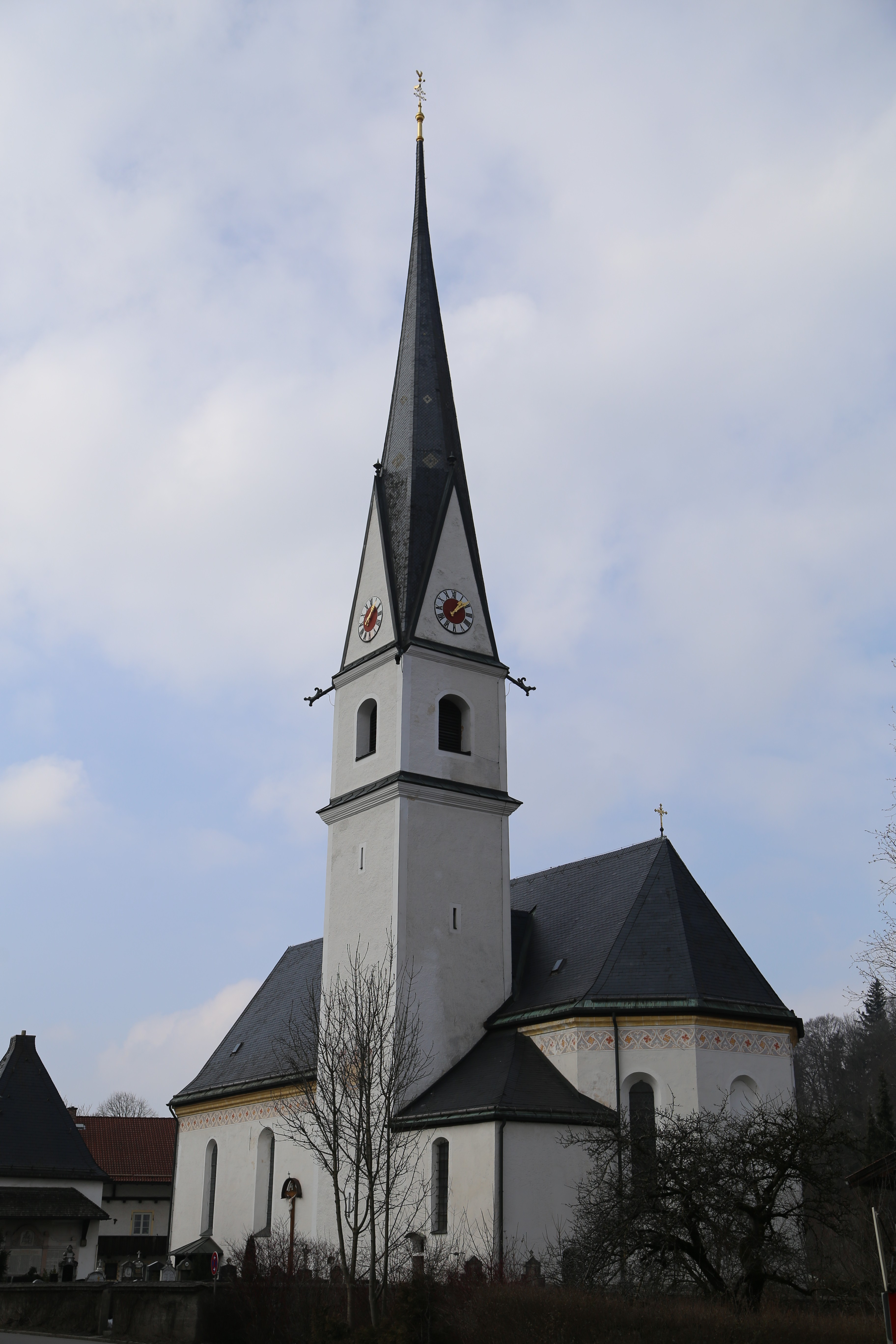 Hauptstraße 24, Frasdorf; Kath. Pfarrkirche St. Margaretha, Saalbau mit Satteldach und Südturm mit Spitzhelm über Giebeln, spätgotisch, 1466-96 Langhaus, 1496-1511 Chor und Gewölbe, 1676 Sakristei, 1807 erweitert, 1736 Barockisierung des Inneren, 1764-65 Turmoberbau neugotisch verändert; mit Ausstattung